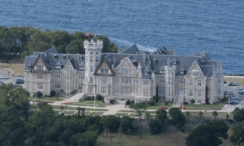 Vista Aérea del Palacio de la Magdalena (Santander)